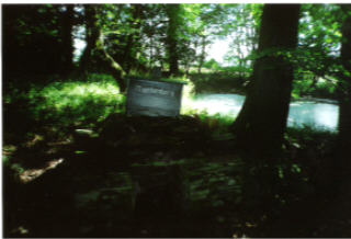 Nievoldhagen